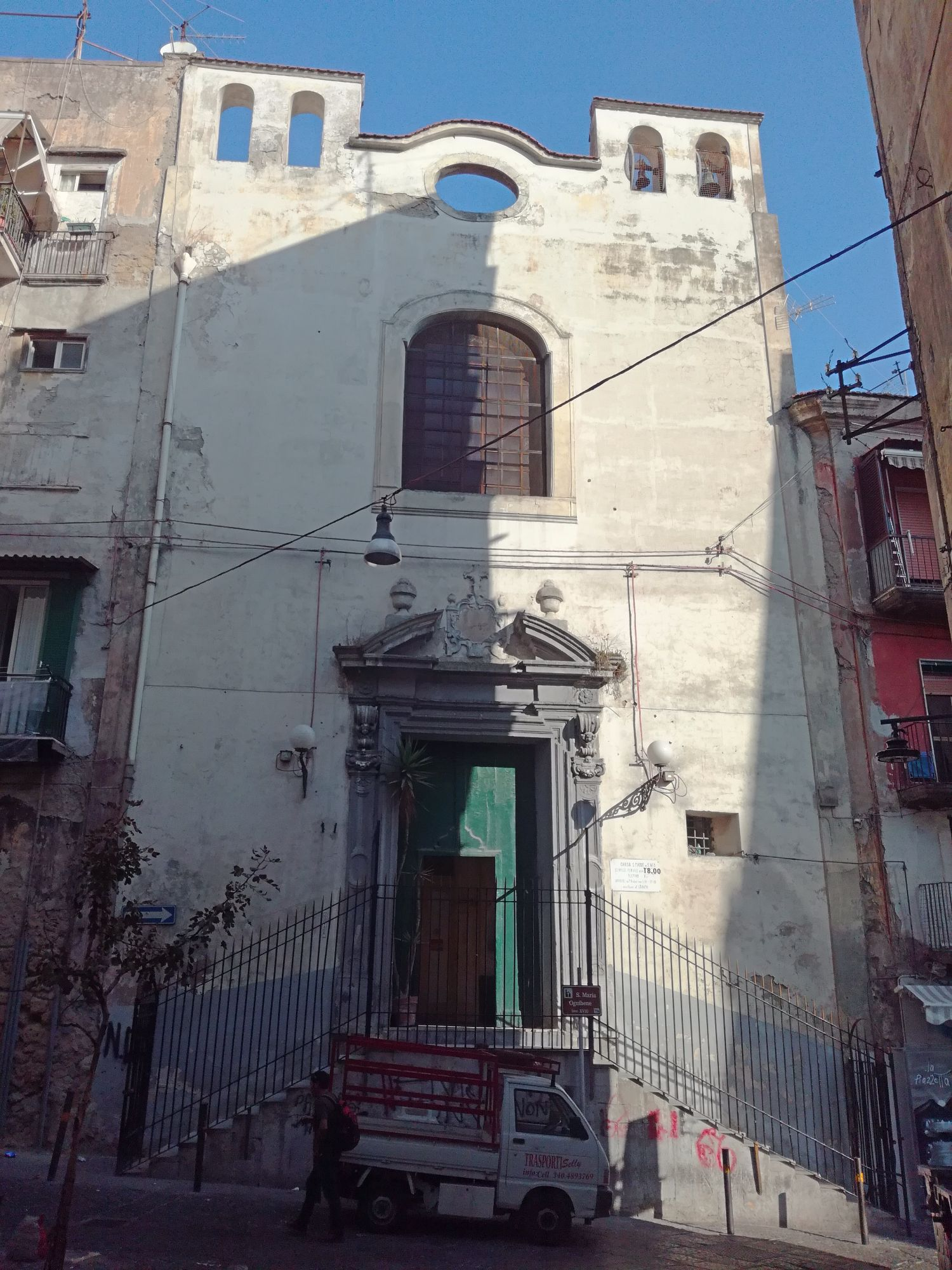 Chiesa di Santa Maria Ognibene (Napoli)